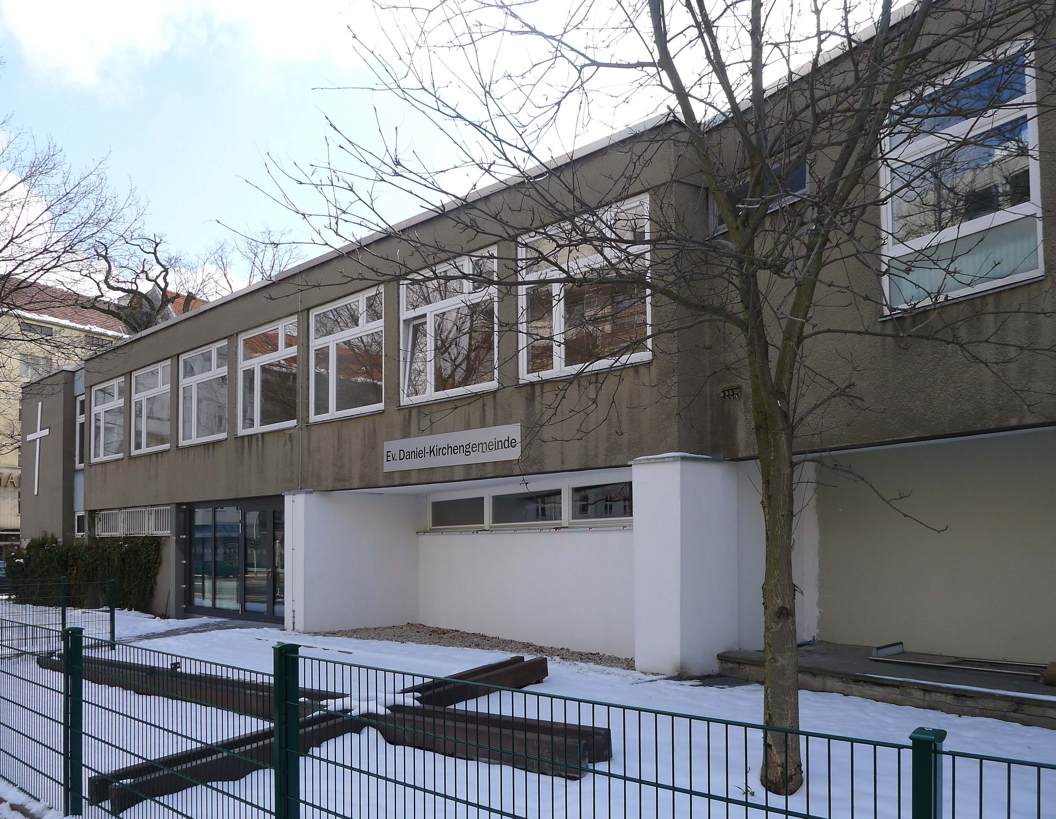 Blick auf das Gemeindezentrum von der Münsterschen Straße aus.